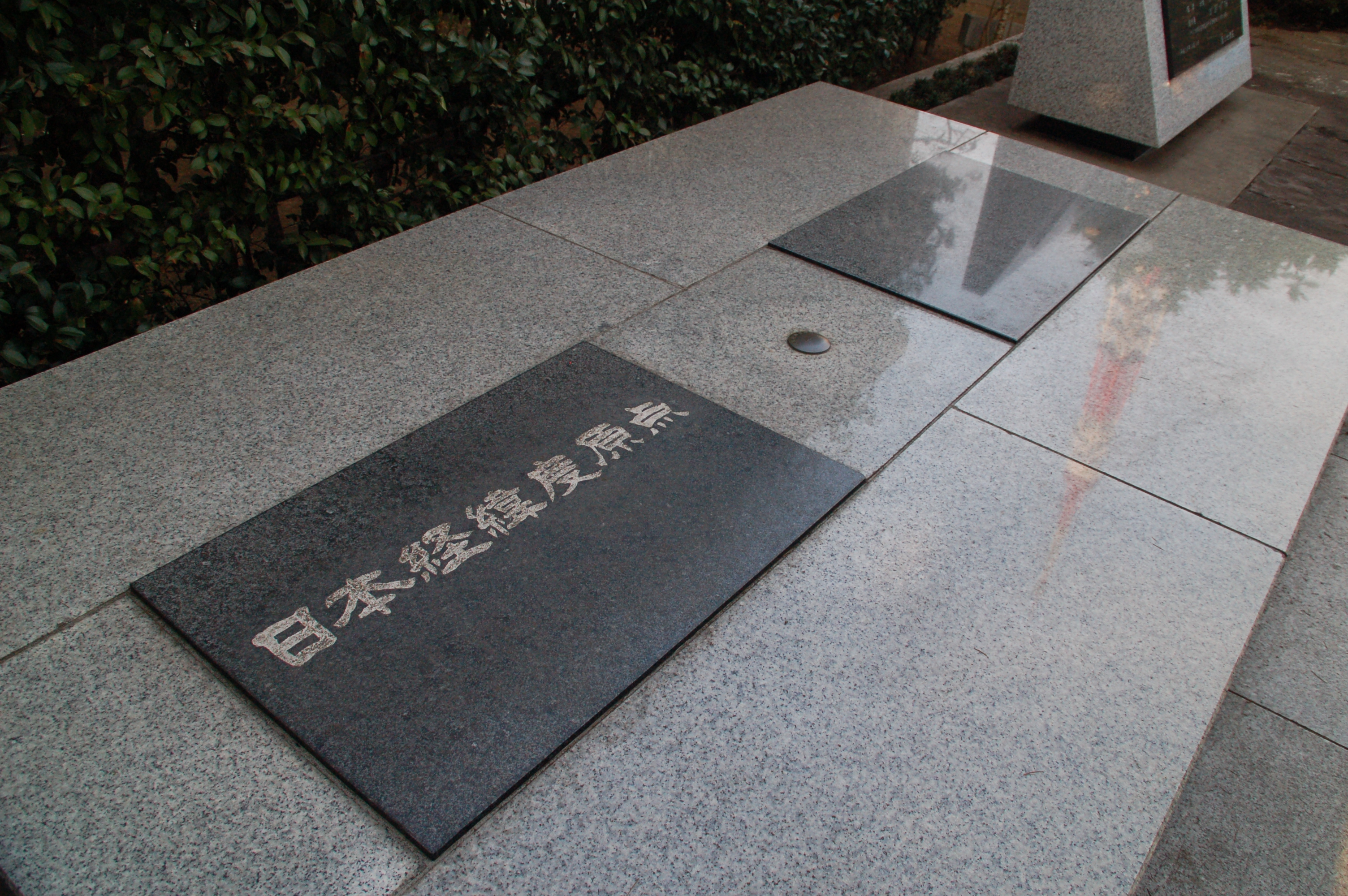 日本経緯度原点 (Japan geodetic datum)